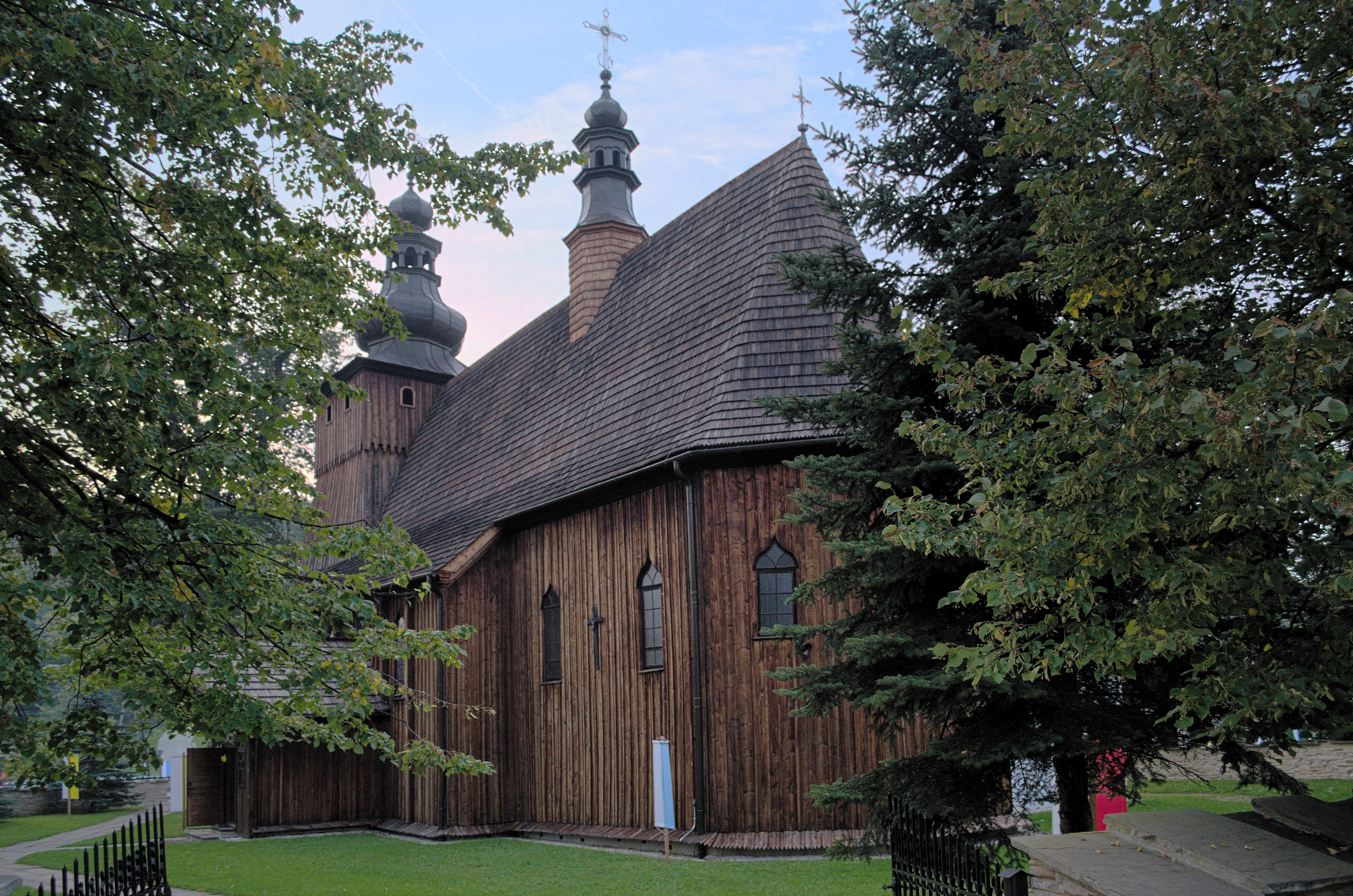 Krużlowa Wyżna, zespół kościoła par. p.w. Narodzenia NMP